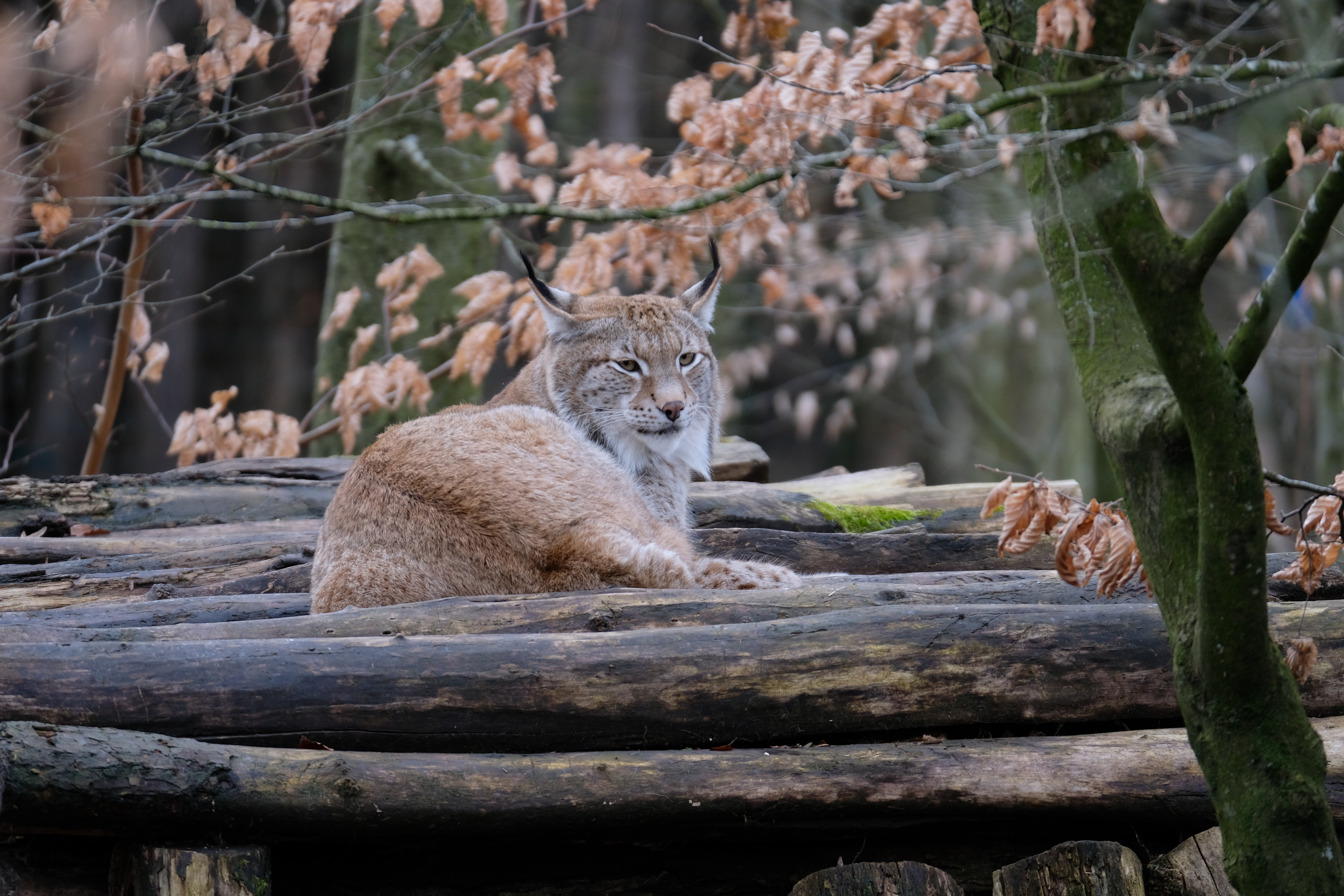 Lynx dans le parc animalier de Sainte-Croix en Moselle.